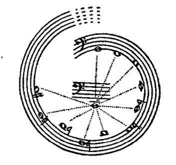 SistemaPlanetario Hindemith